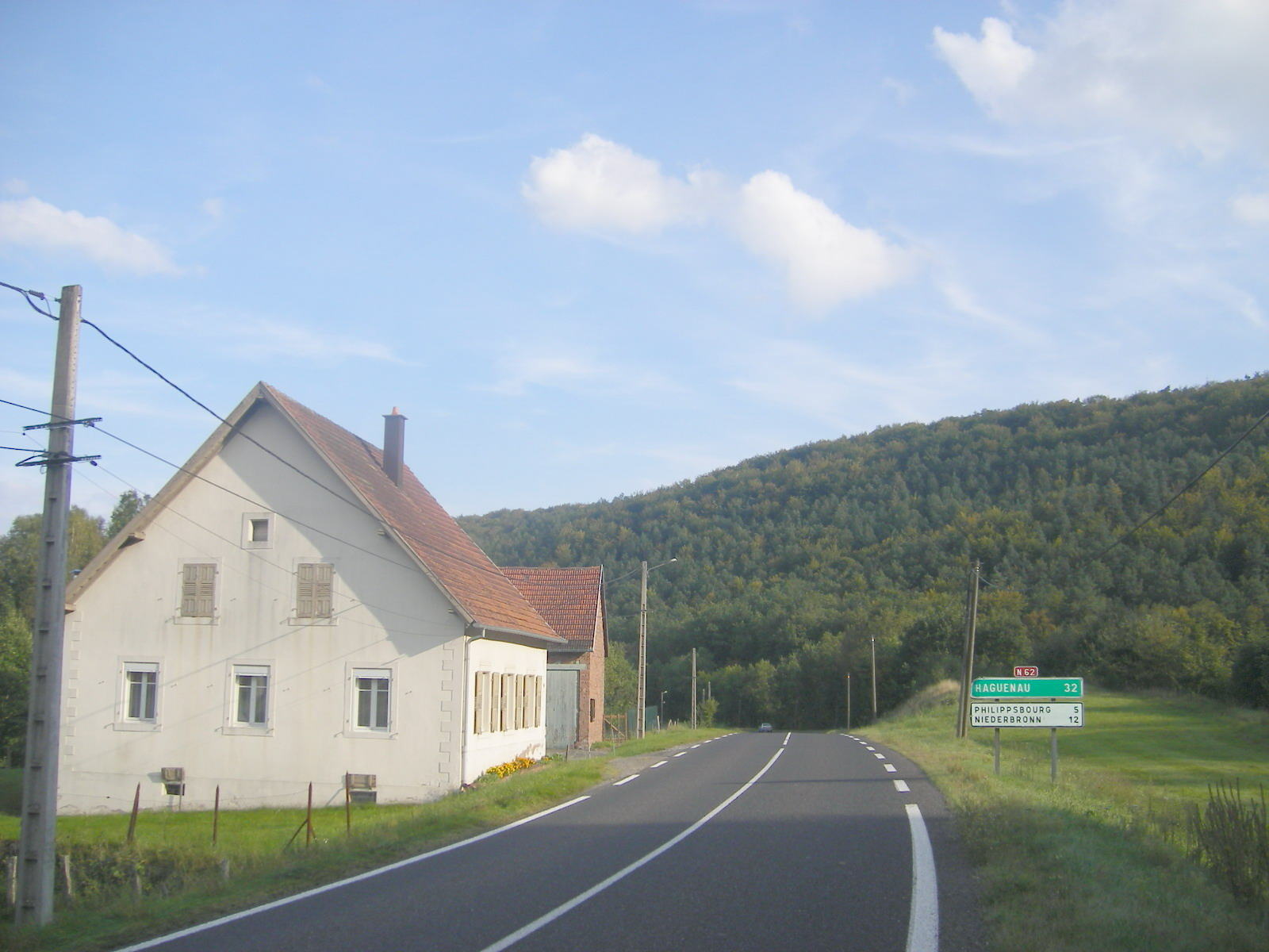 Landscape between Éguelshardt and Philippsbourg (near Bannstein)